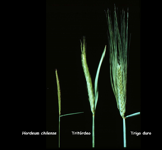 ESPIGAS DE TRITORDEO